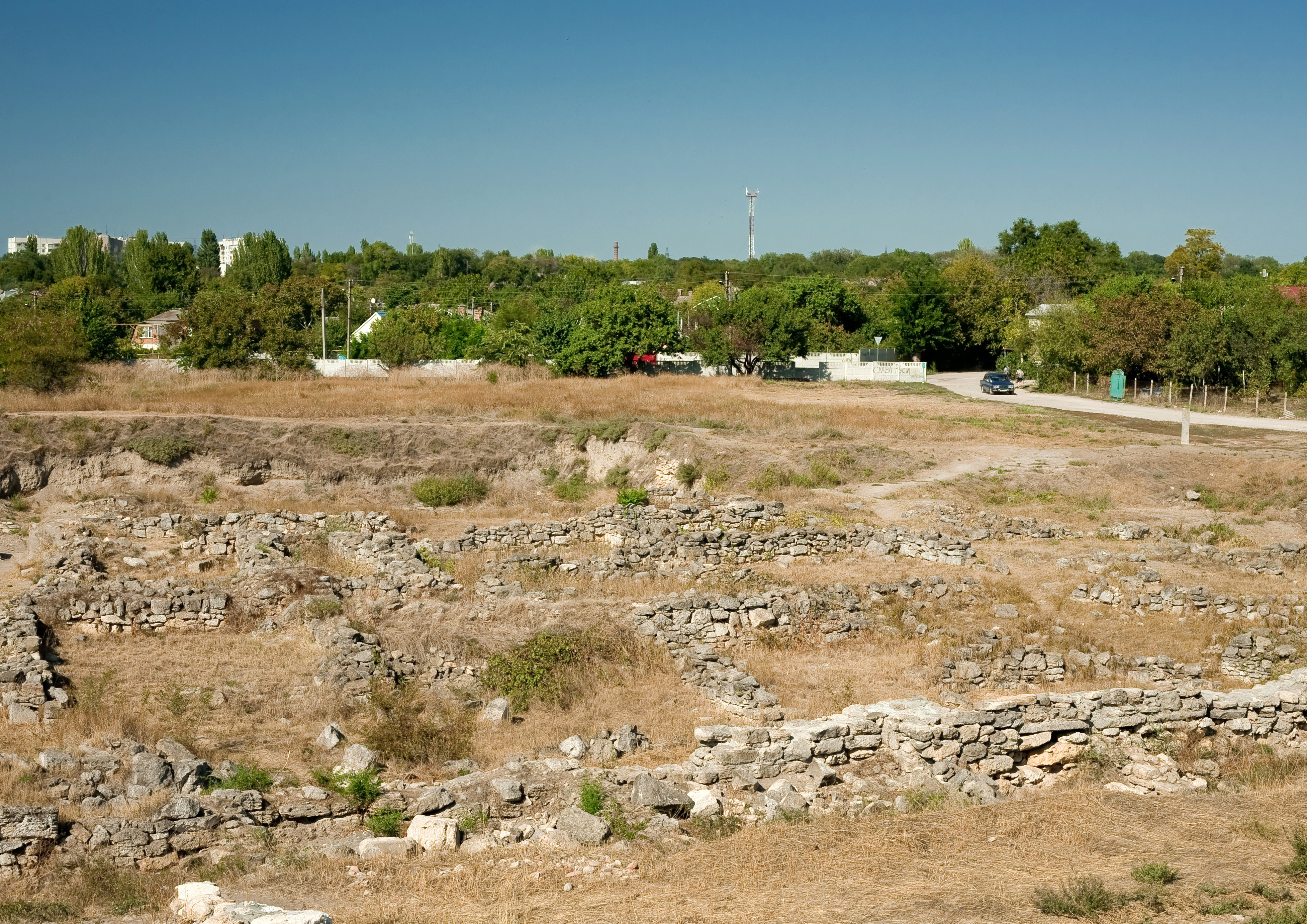 Керч, між вул. Войкова та вул. Московською, 52-а